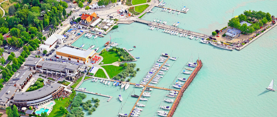 BYC kikötő